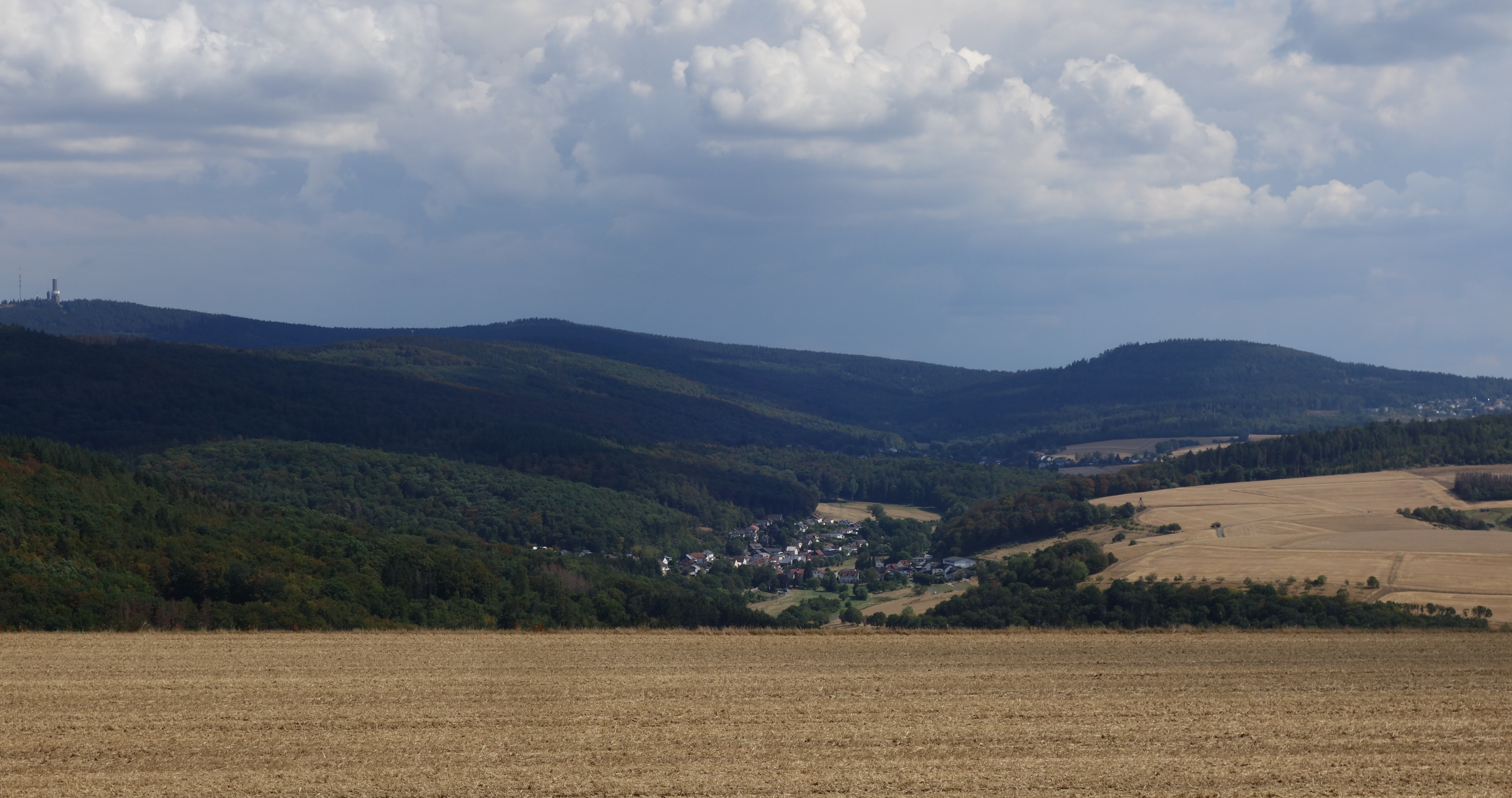 Waldems - Wüstems von Nordwesten gesehen, umrahmt von den bergen des Hohen Taunus (am Horizont von Links Großer und Kleiner Feldberg sowie Glaskopf; mittig, unterhalb des Kleinen Feldbergs Weilsberg mit Hühnerberg als Fortsetzung